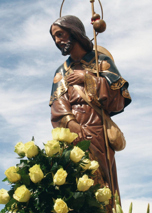 San Roque, Foto: José Zamora